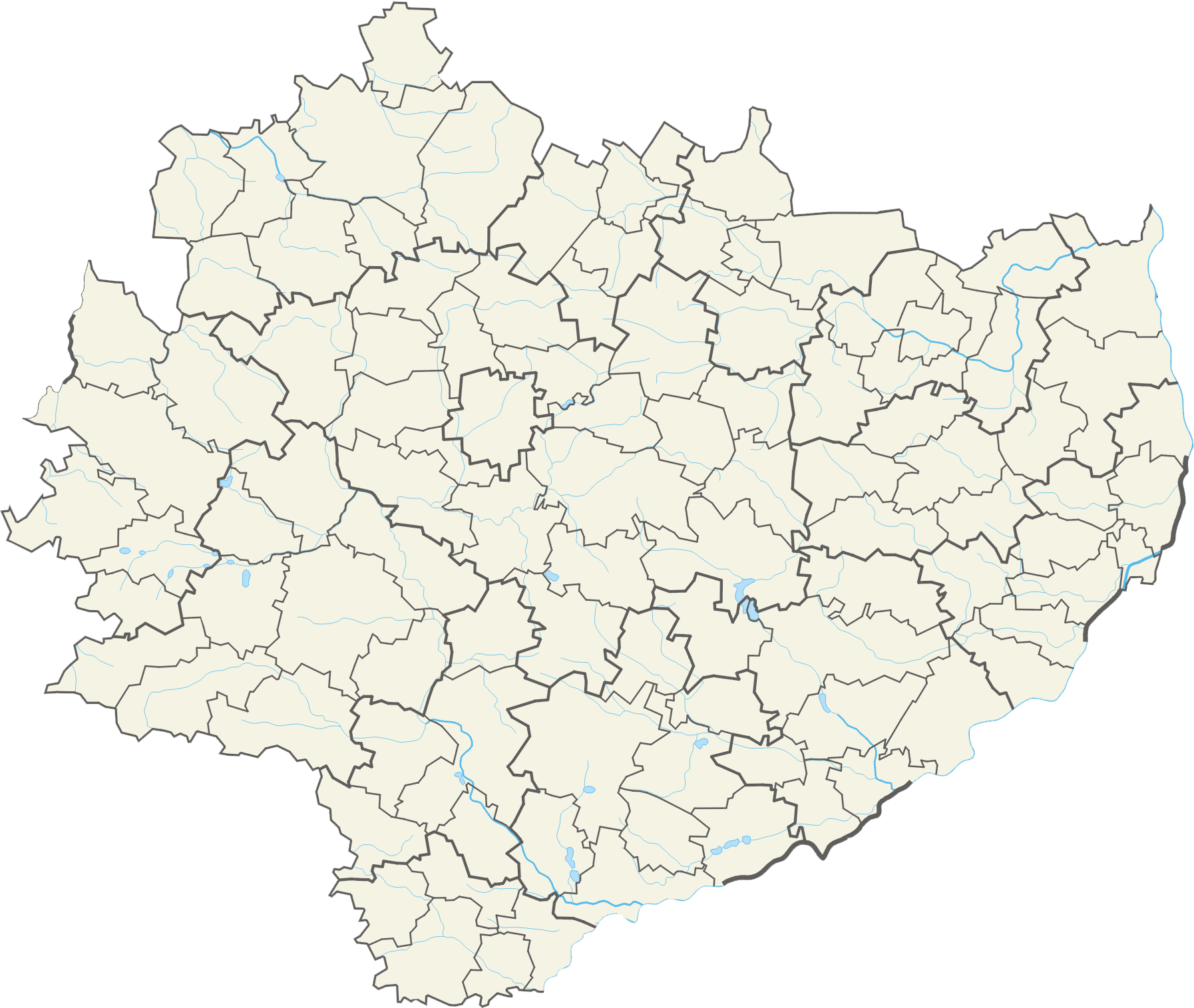 Województwo świętokrzyskie – powiaty i gminy Współrzędne graniczne mapy: N: 51.3425° N S: 50.1858° N W: 19.7044° E E: 21.8693° E